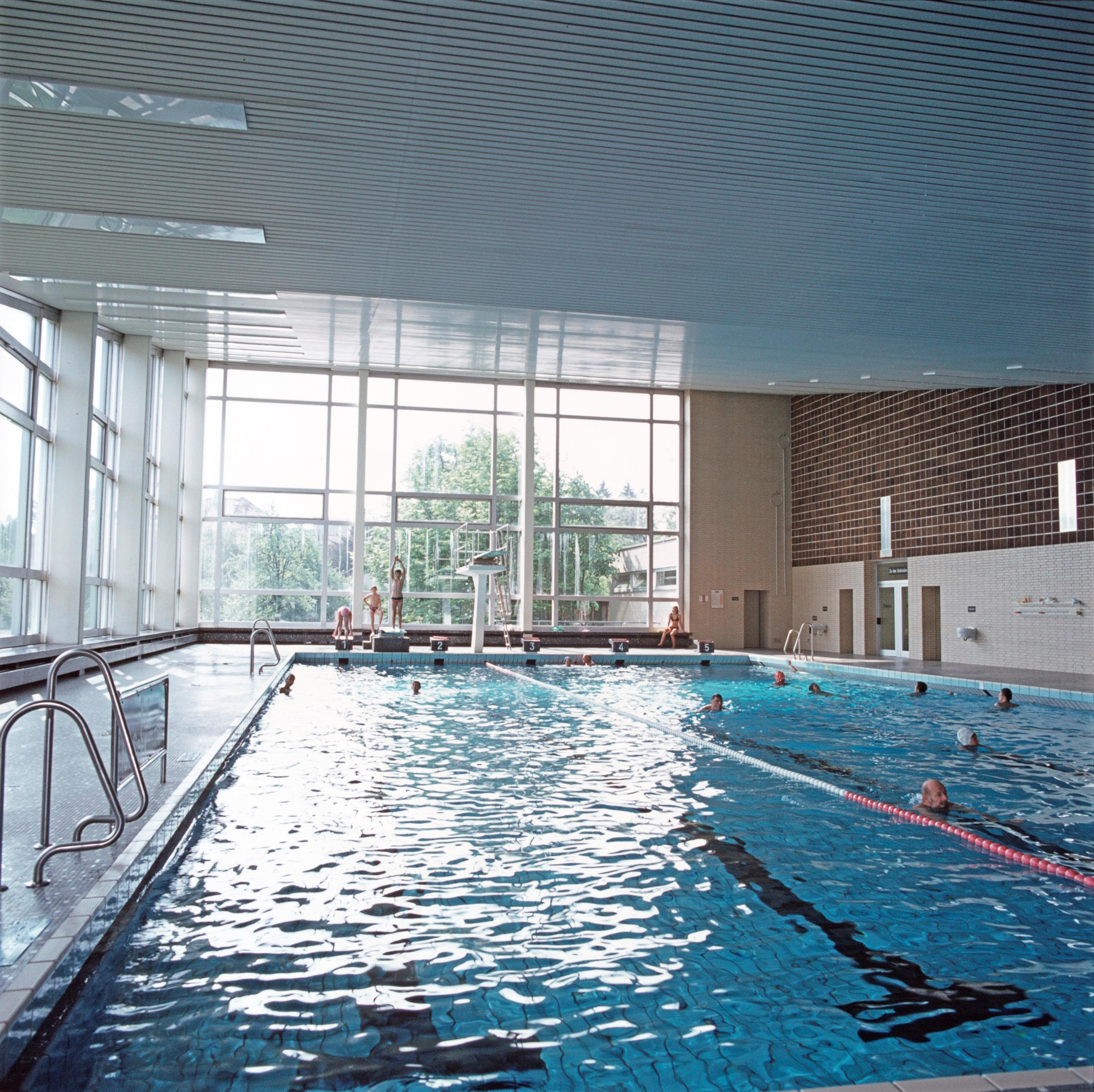 Das Dornbirner Hallenbad (heute Stadtbad Dornbirn) im Frühling 1974 von innen mit Blick auf das Hauptschwimmbecken.